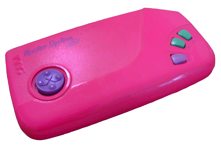 Master System Girl transparent